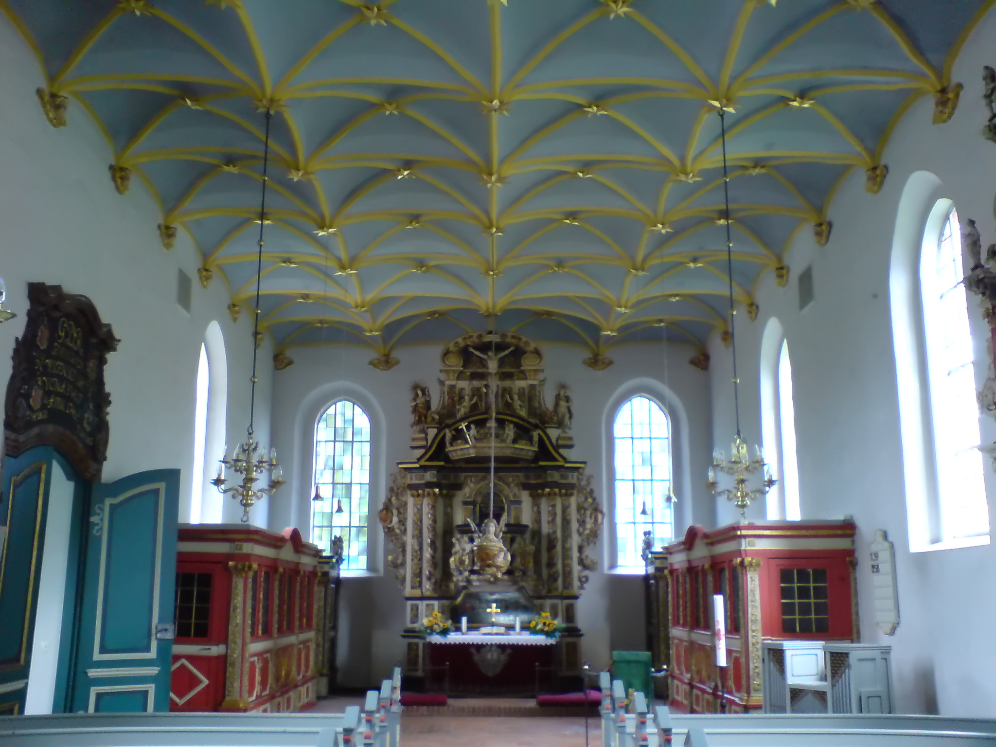 Ahrensburger Schlosskapelle